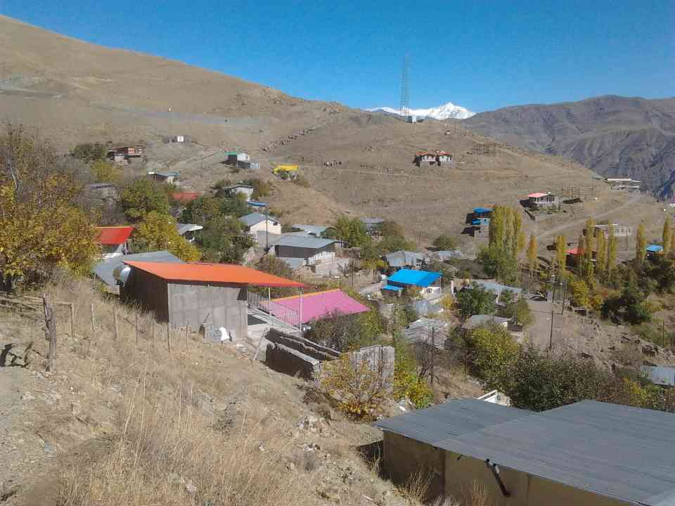 امرودک (تابستان 93)